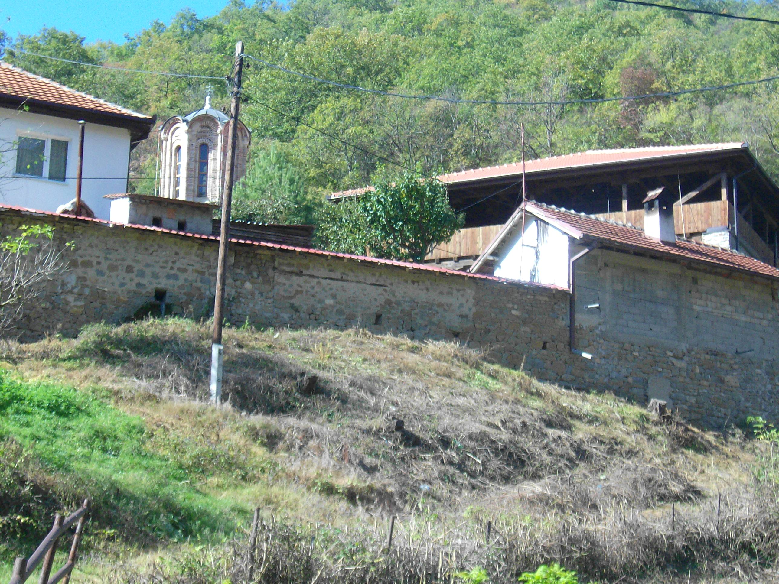 Manastir Sv.Arhangeli (Mihail i Gavril)- Kuceviste